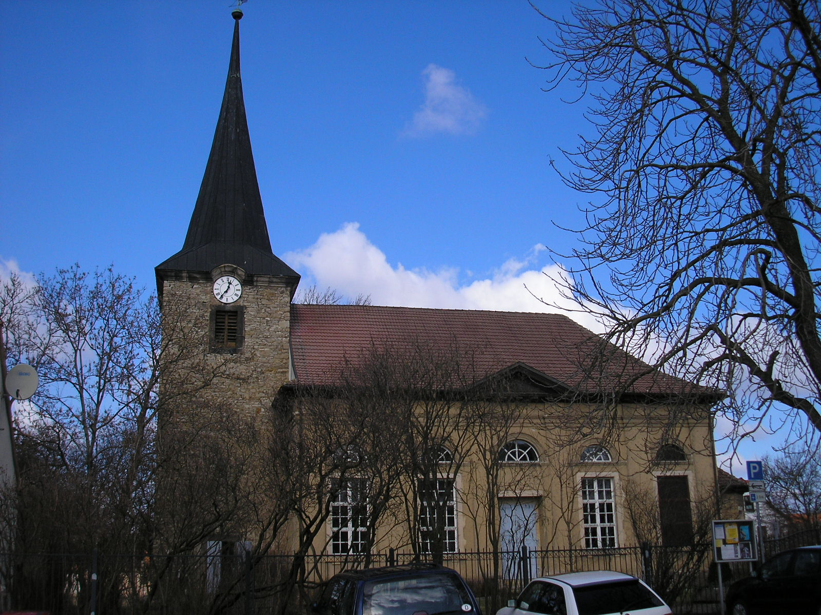 Die Martinikirche in Erfurt-Ilversgehofen (Thüringen).